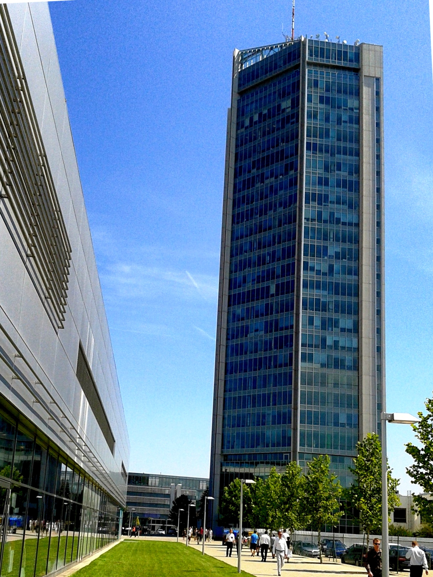 Pohled z jihu